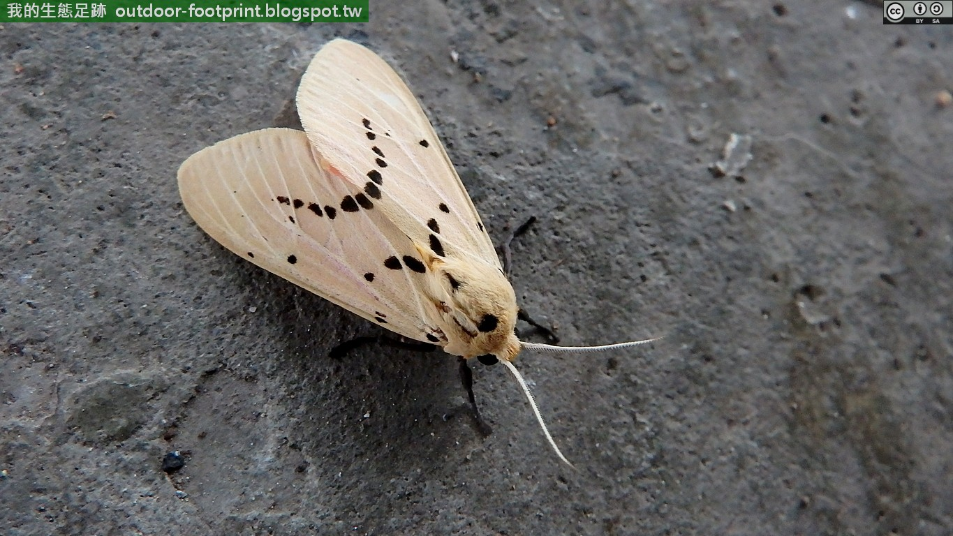 橙污燈蛾#Spilarctia postrubida